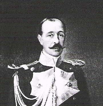 le Comte de la Vega del Sella